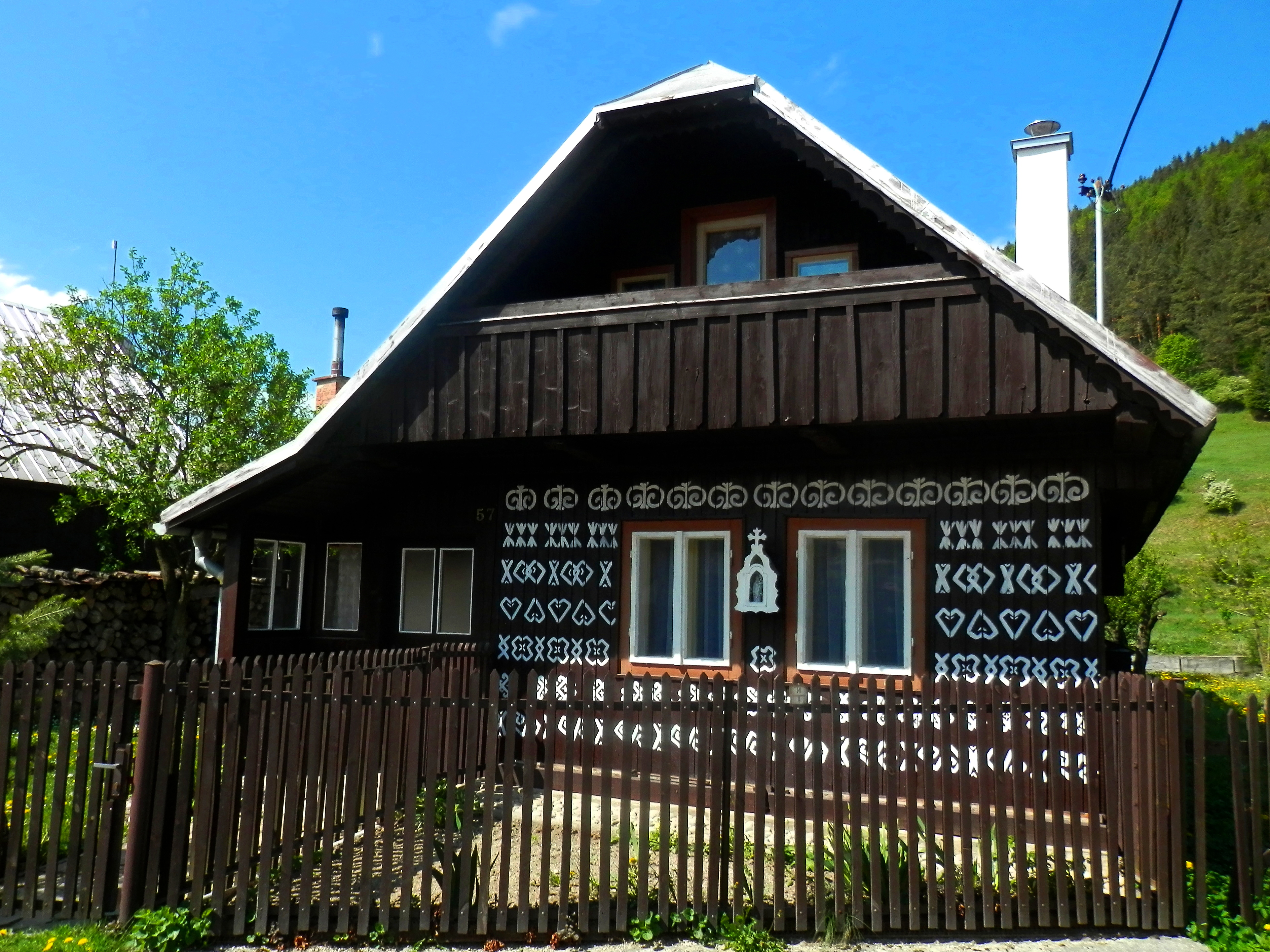 Obec Čičmany, je najvyššie položenou obcou v Žilinskom okrese. Prvé zmienky o nej pochádzajú z roku 1272 Obec je známa maľovanými zrubovými drevenicami. Dolnú časť obce v roku 1977 vyhlásili za pamiatkovú rezerváciu ľudovej architektúry. Slovensko.